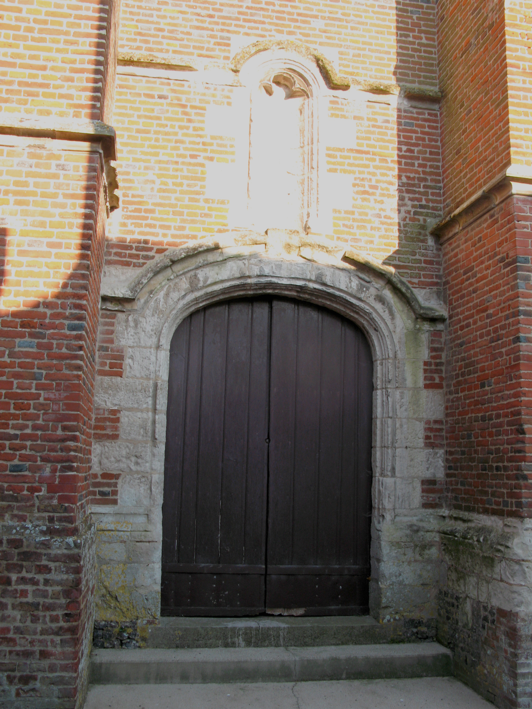 Citerne (Somme, France) - Porche de l'église.